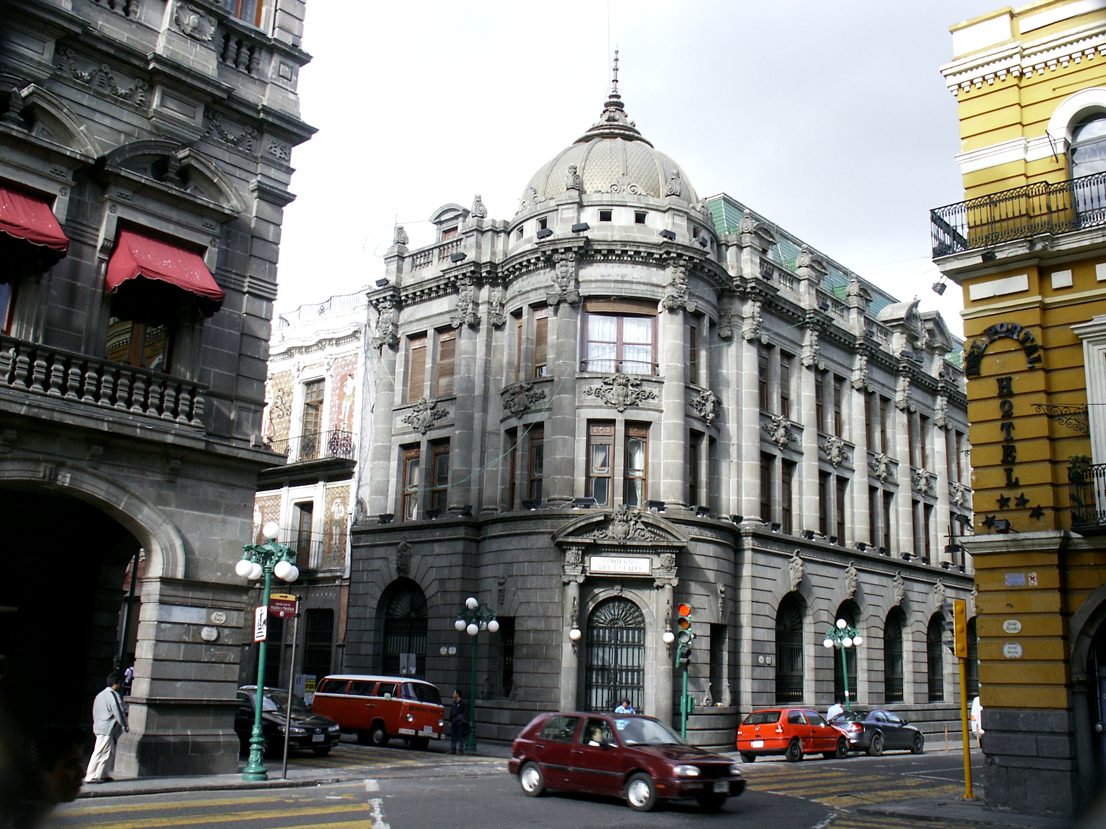 Palacio de Gobierno del Estado de Puebla, en la ciudad de Puebla de Zaragoza (México)